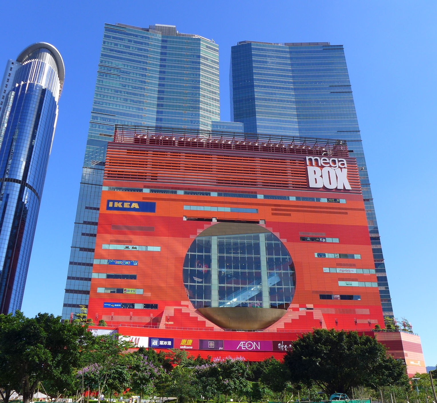 Enterprise Square Five